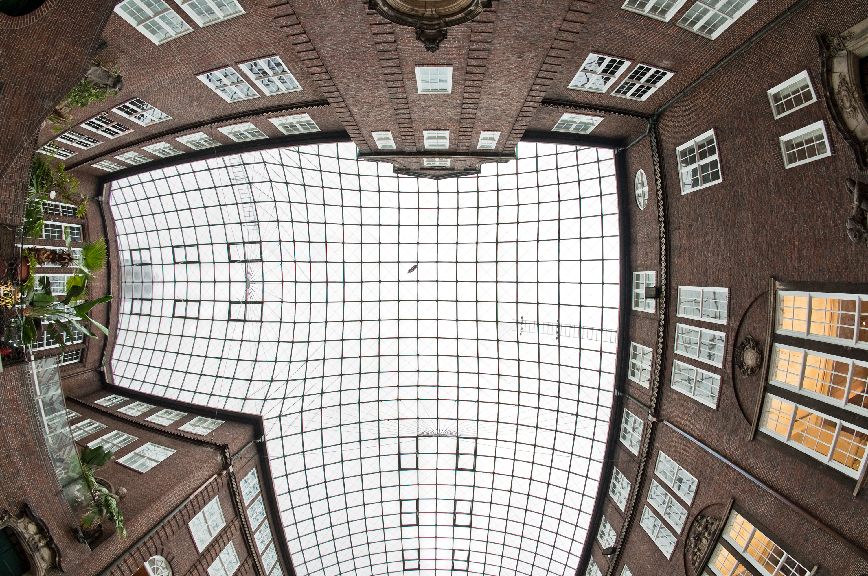 Innenhof des Museums für Hamburgische Geschichte